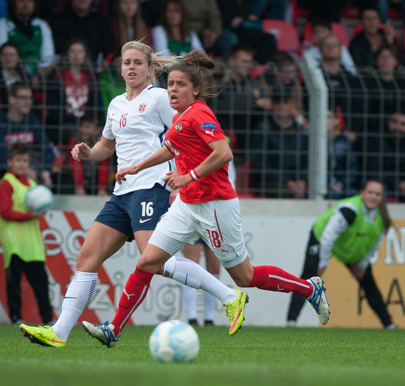 Steyr, Austria, 10.04.2016, ÖFB Frauen EM-Qualifikation - Österreich vs Norwegen. Bild zeigt Elise Thorsnes (NOR) und Laura Feiersinger (AUT).